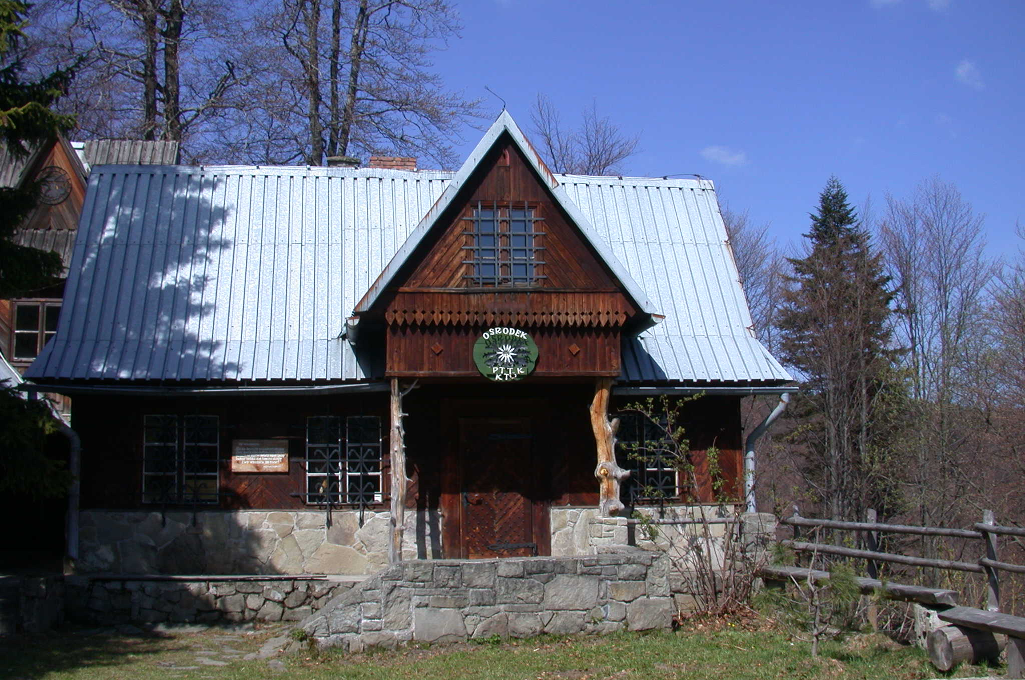 Ośrodek - muzeum PTTK obok schroniska pod Jaworzyną Krynicką